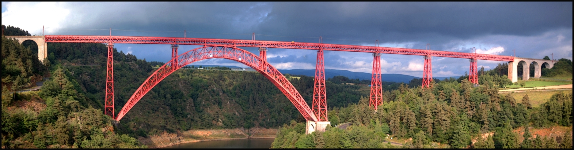 Ruynes-en-Margeride, Viaduc de Garabit, Panorama .